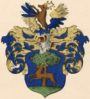 Rehreni suguvõsa aadlivapp